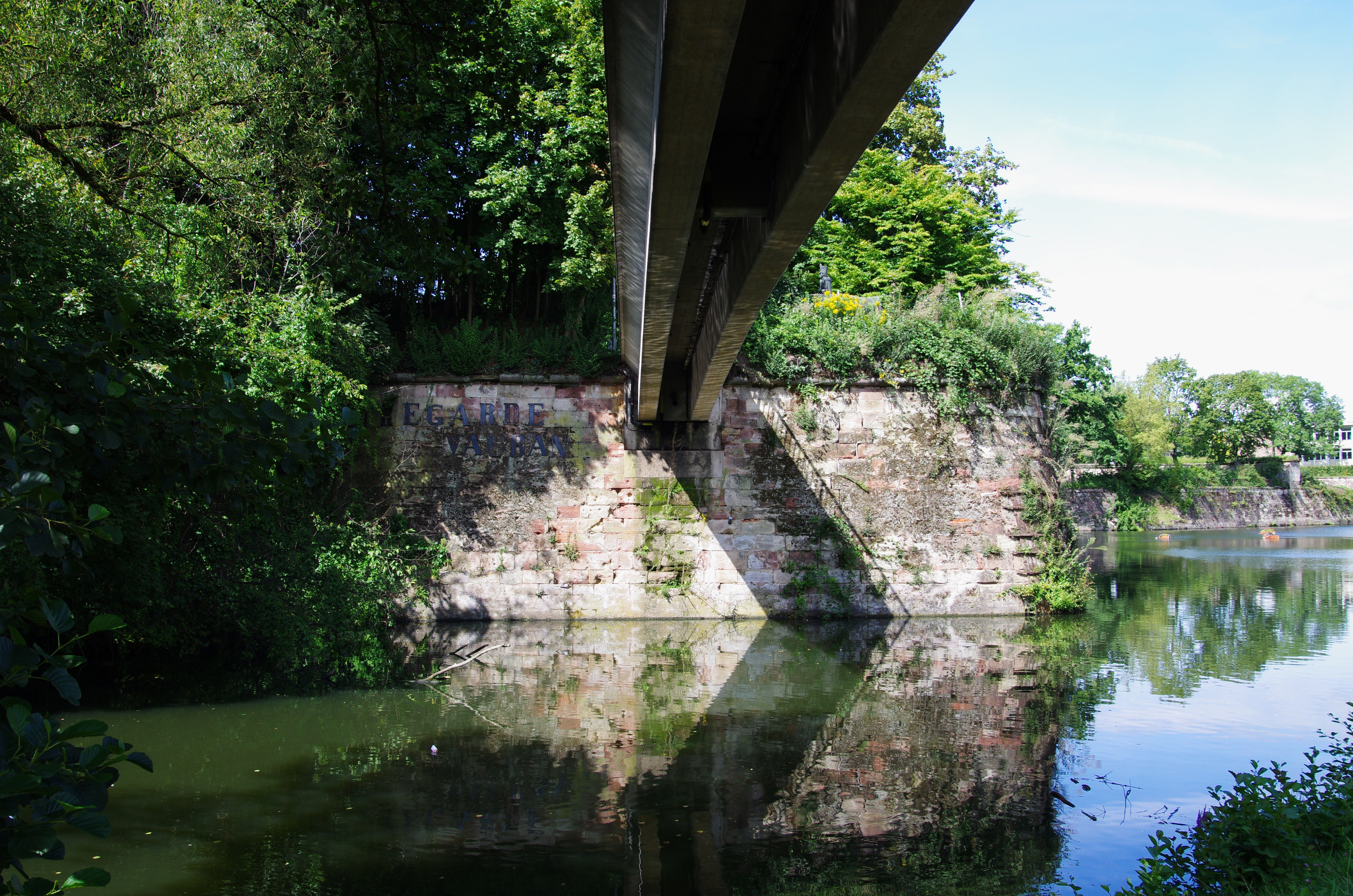 Festungsmauer in Saarlouis